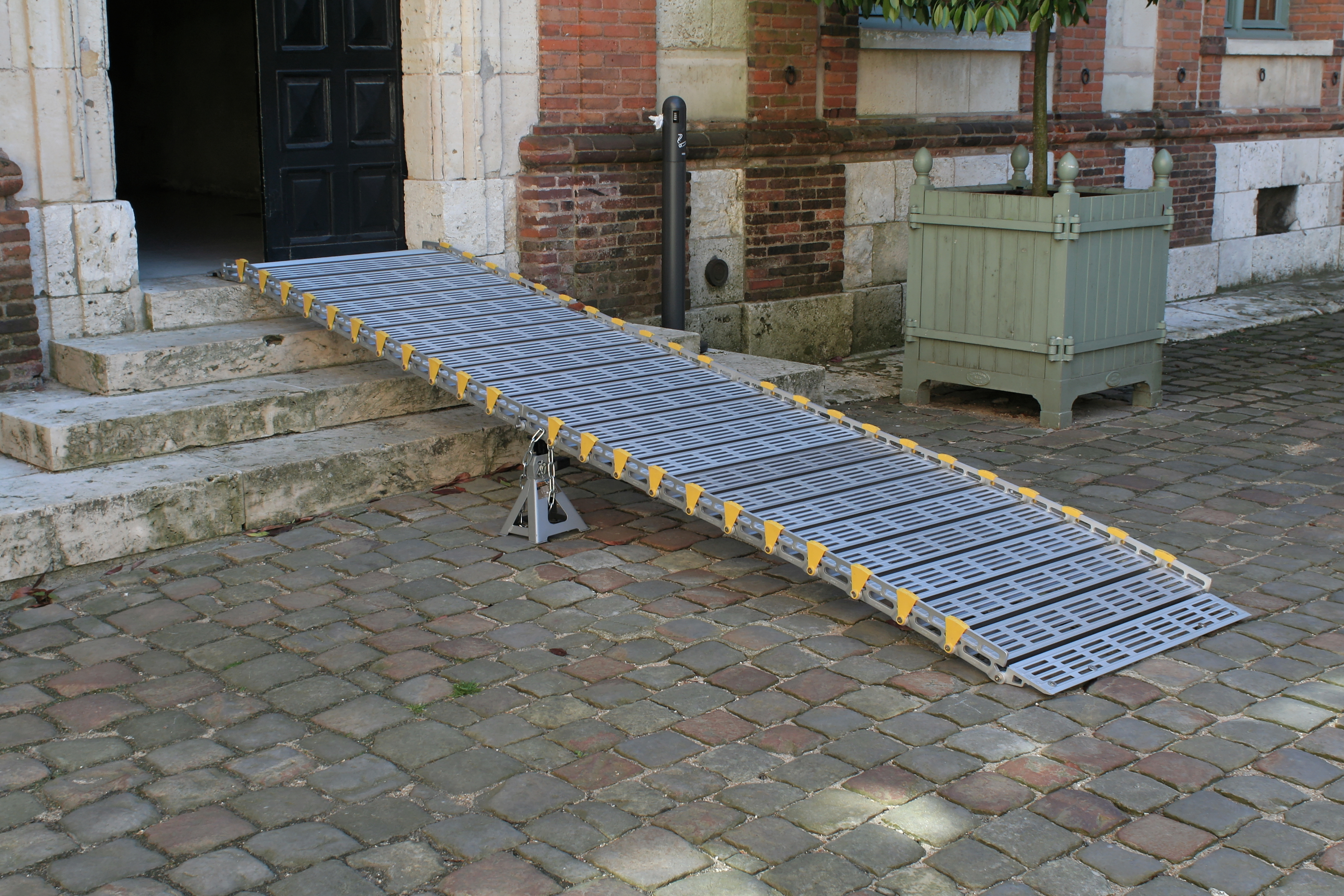 Chartres, hôtel Montescot : rampe PMR. .